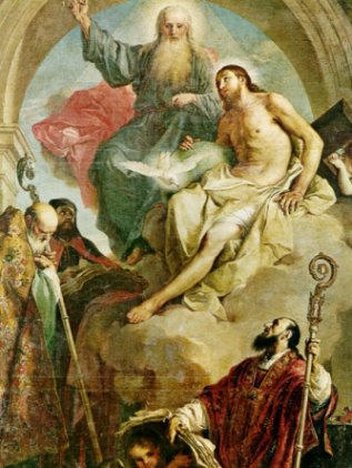 Sainte Trinité avec les saints Niccolò, Basili et Grégoire.